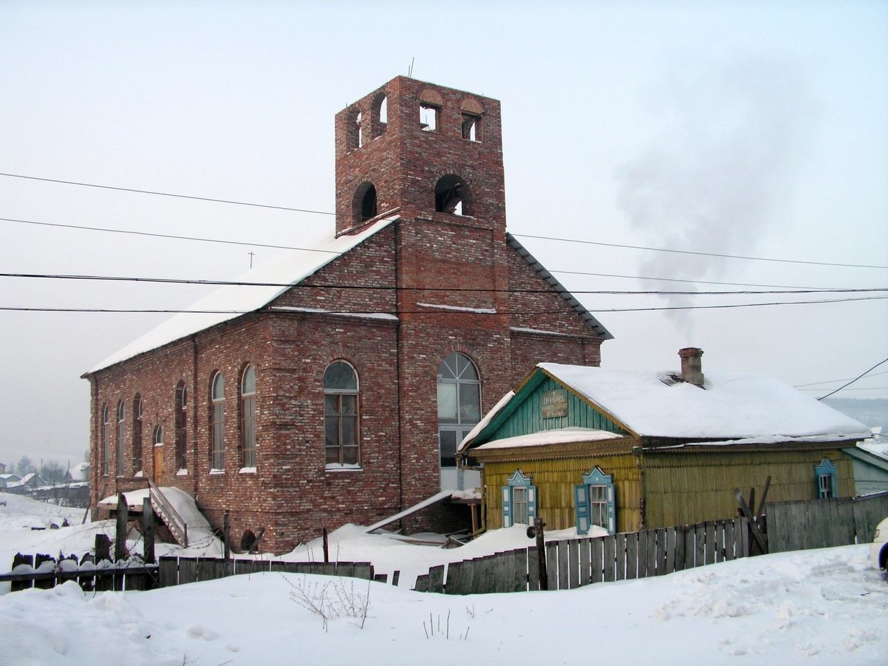 Строительство нового молитвенного дома церкви ЕХБ "Спасение" города Спасска-Дальнего. На переднем плане - старый молитвенный дом, использующийся более полувека. 2011 год.